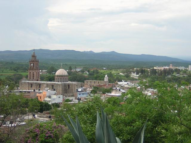 Paisaje de Totatiche